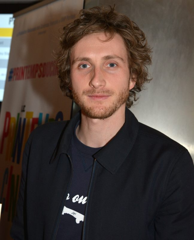 Baptiste Lecaplain à l'ouverture du Printemps du cinéma